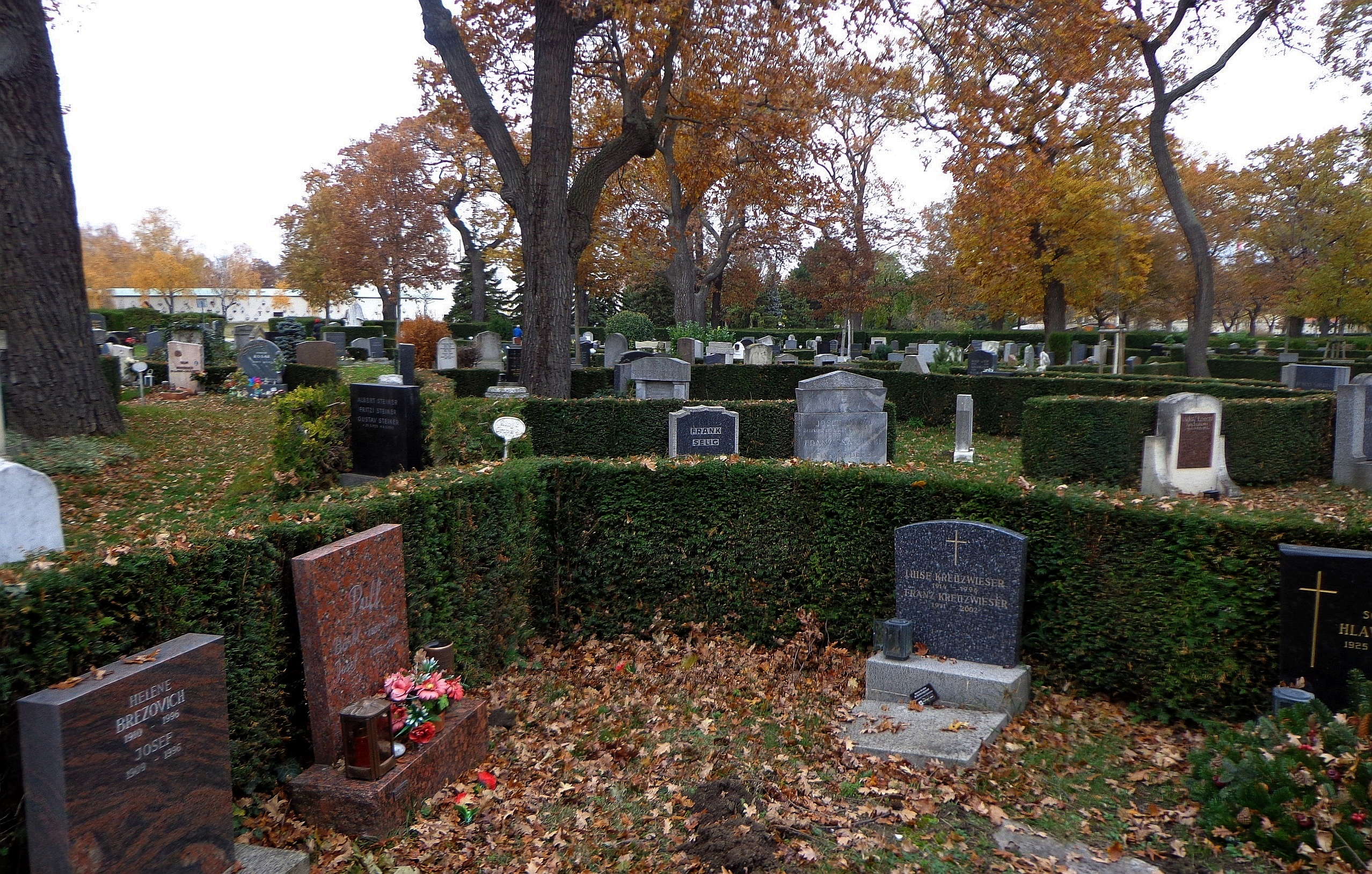 Feuerhalle Simmering: Urnenhain, Erdgräber